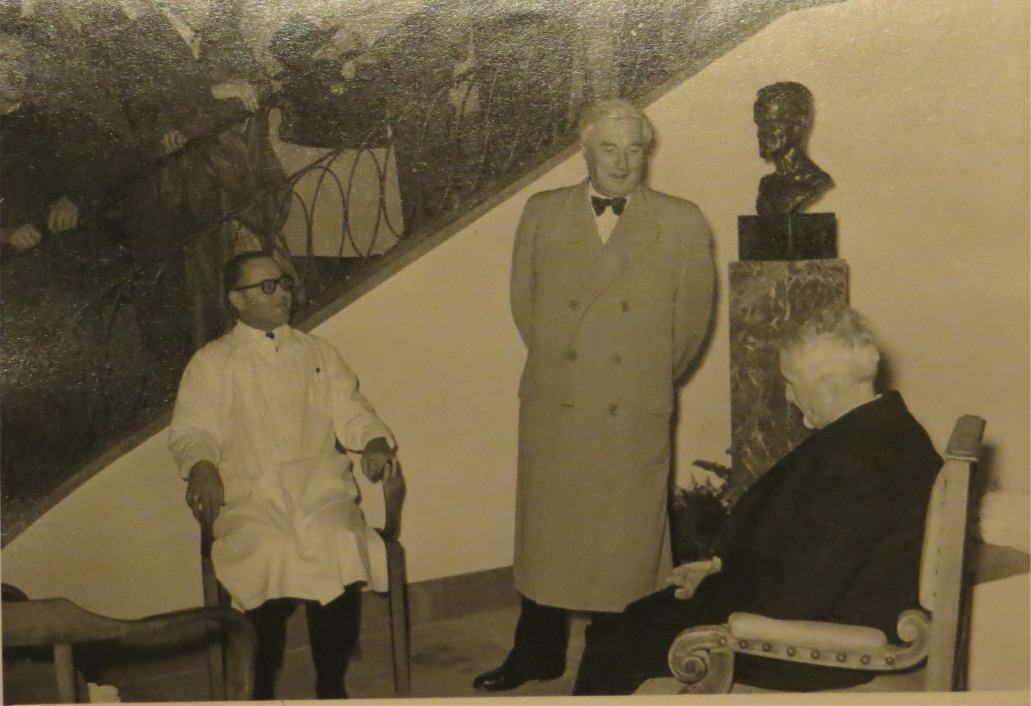 Felix Sieglbauer mit Nachfolger Gustav Sauser bei Einweihung der Büste